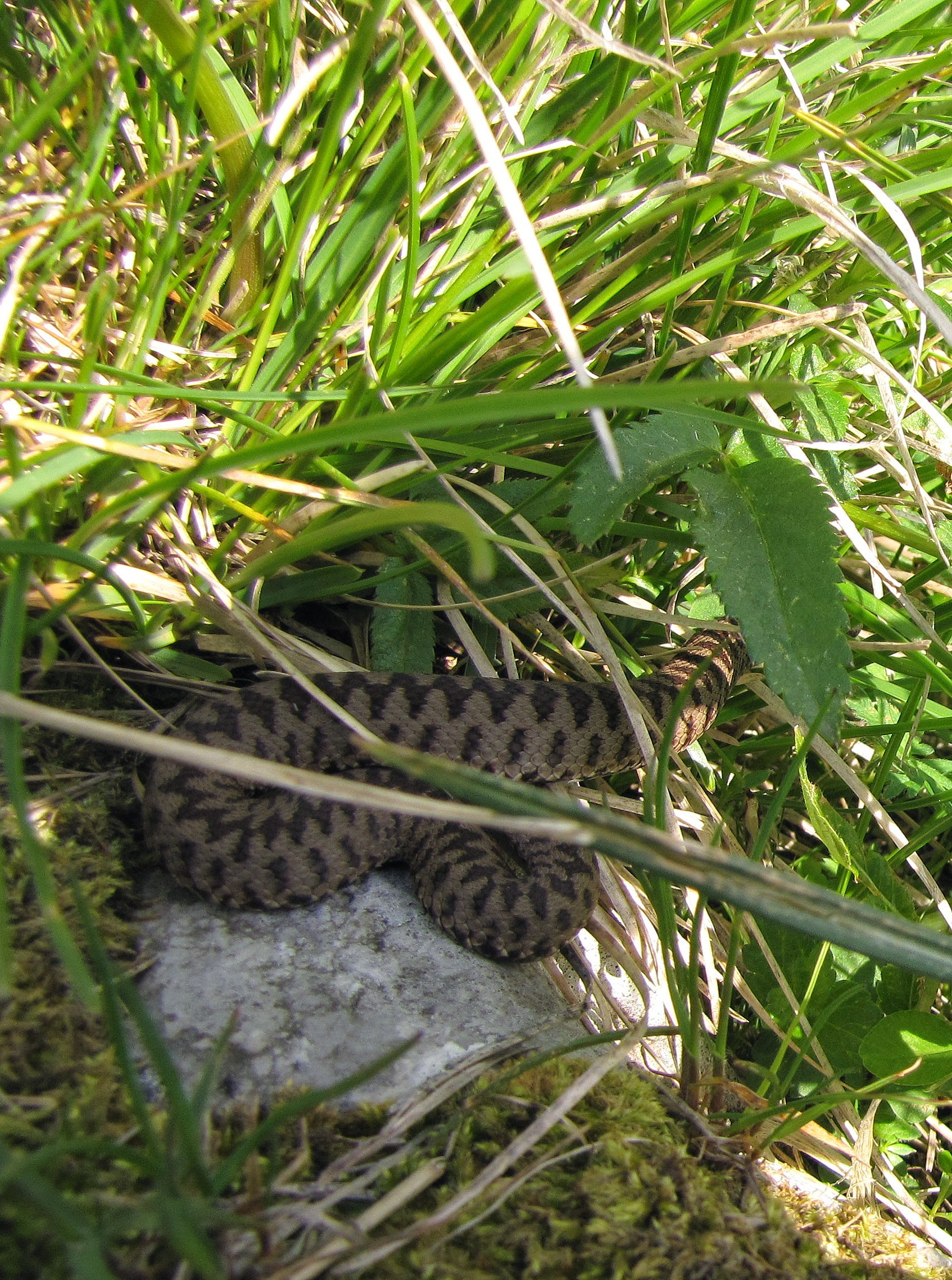 Laški gad (vipera aspis) na pogorju Stola.